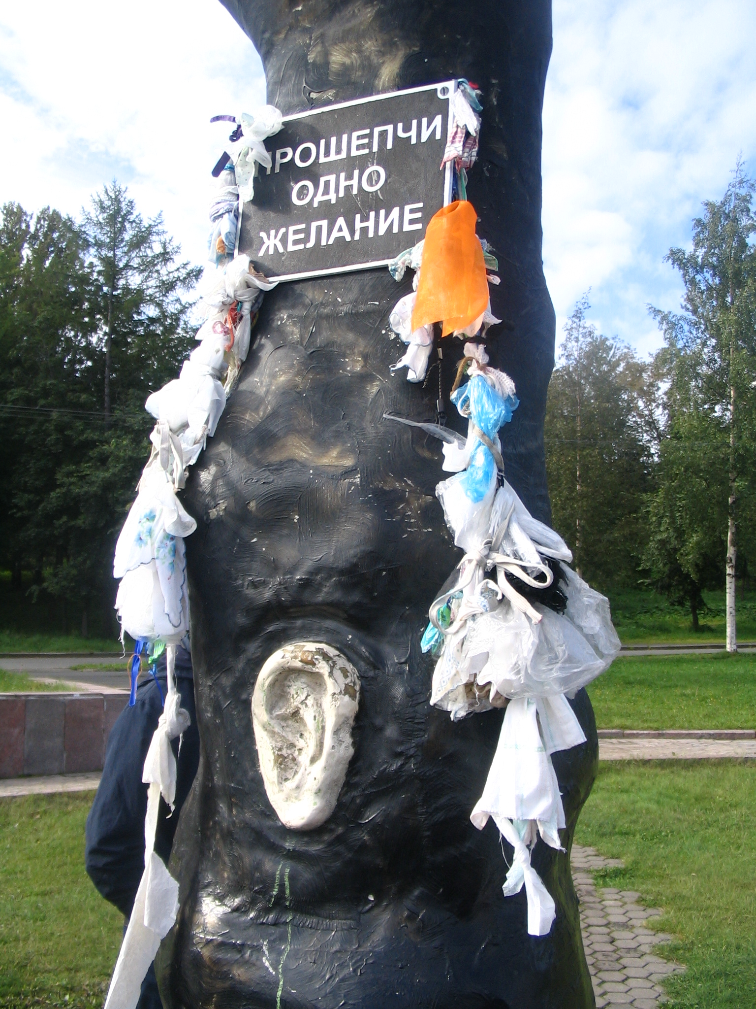 Дерево желаний в Петрозаводске, более ближе